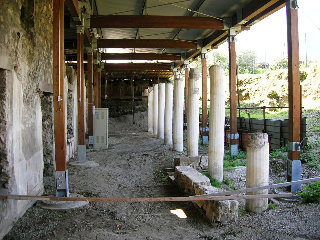 Villa di Arianna a Stabia - Peristilio.